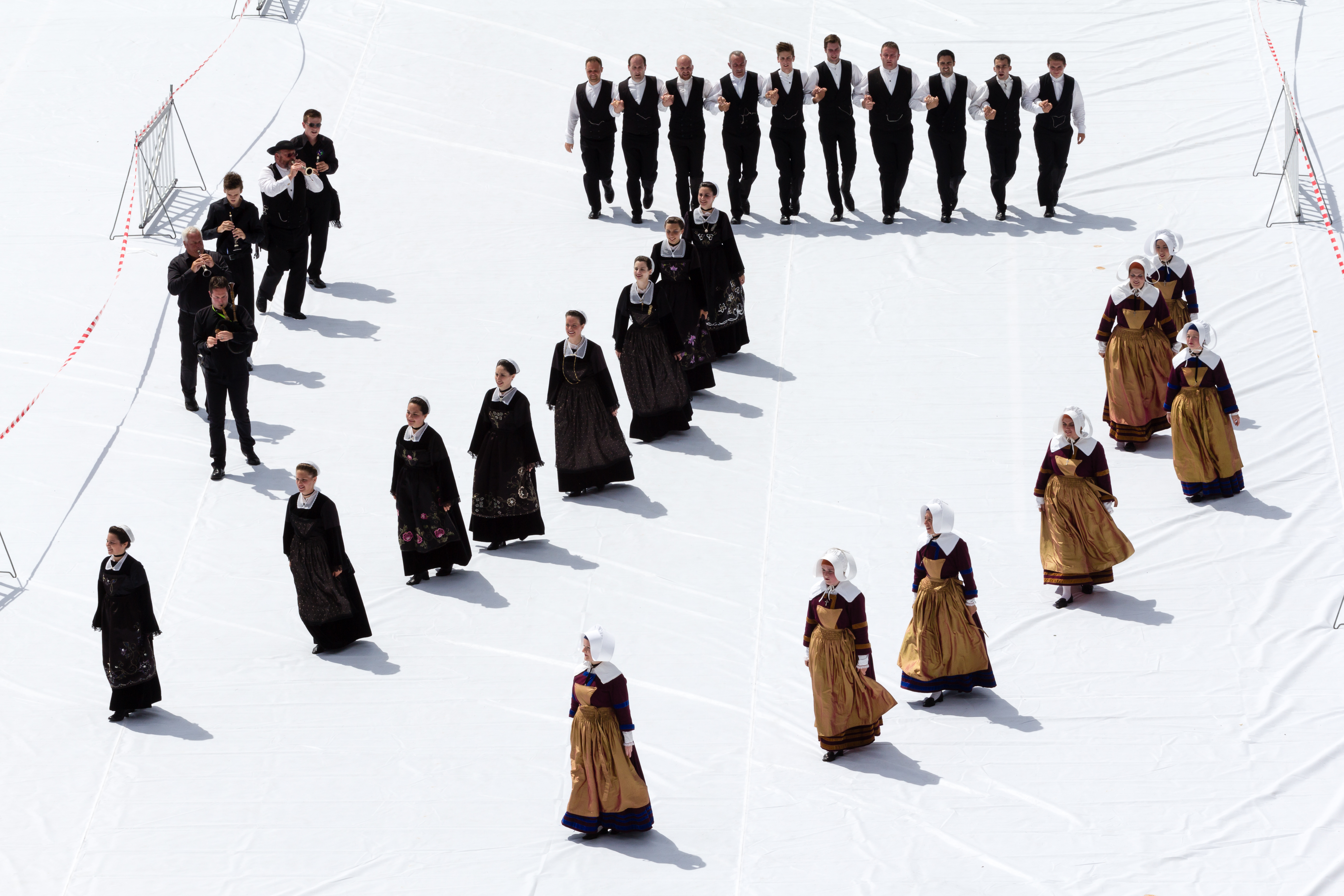 FIL 2012 - Arrivée de la grande parade des nations celtes - Cercle Brug ar Menez